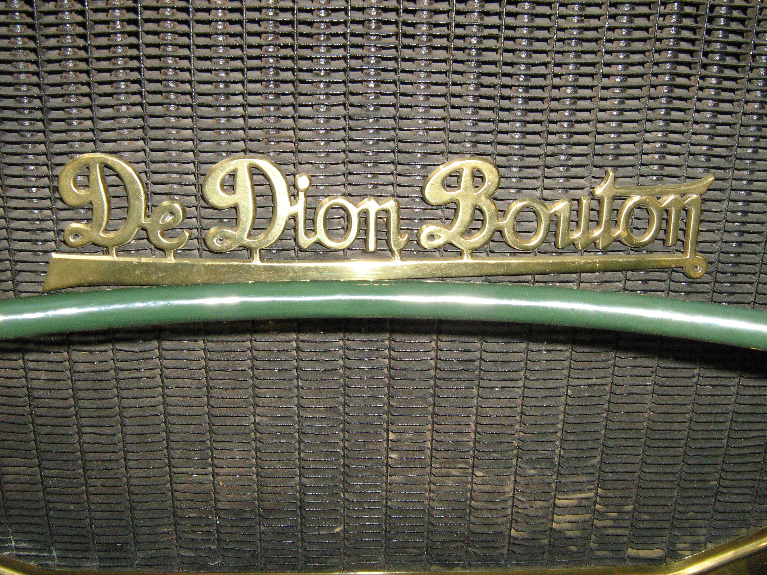 De Dion-Bouton Namensschild am Kühlergrill